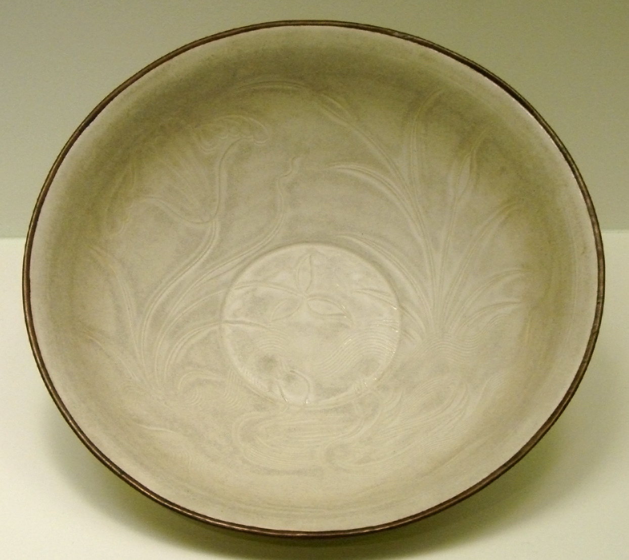 Bol, Chine du Nord, Hebei, Ding, Dynastie des Song du Nord, 11ème-12ème siècle, porcelaine à couverte blanche, décor incisé. Musée Guimet, Paris.